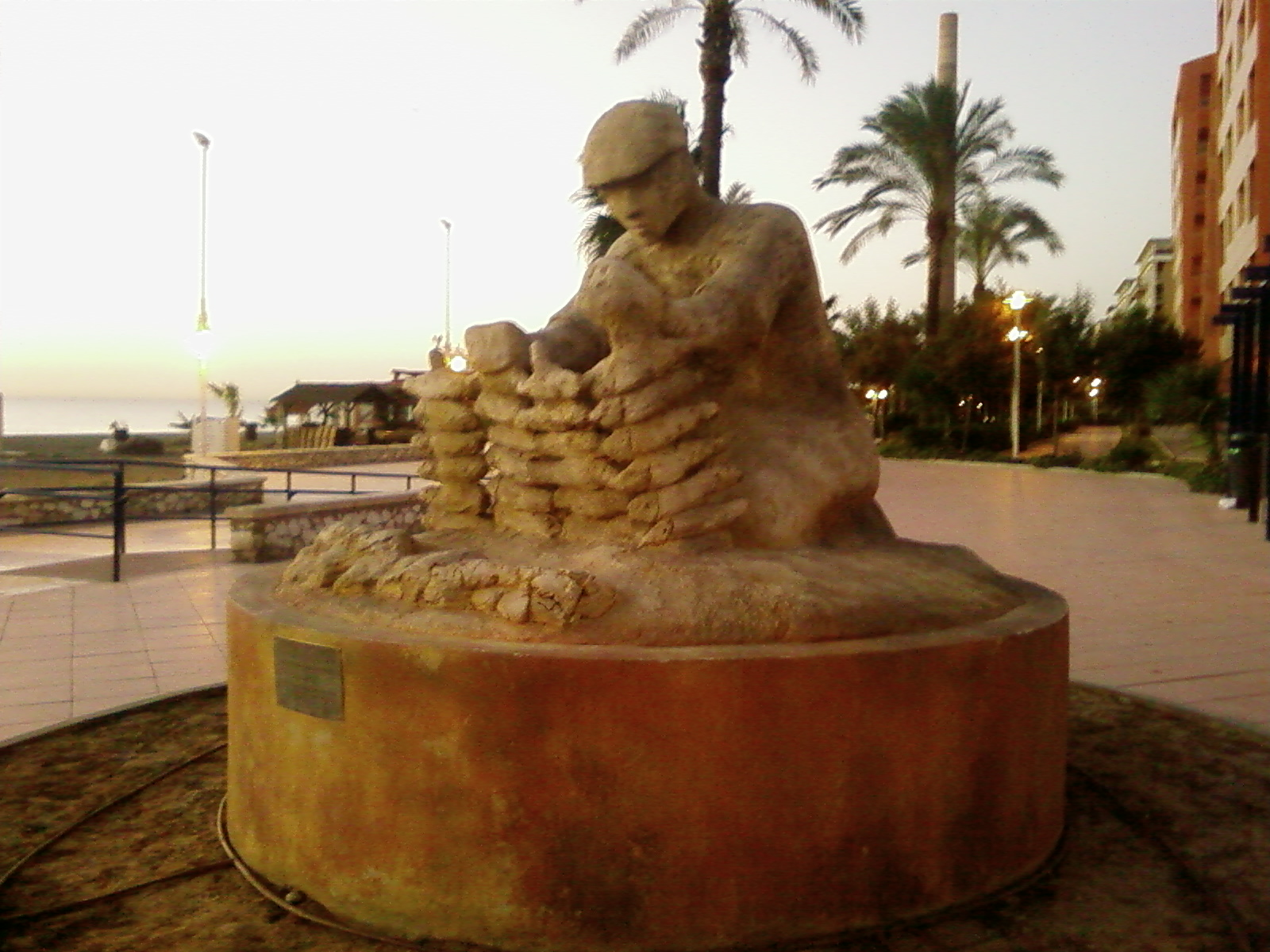 Monumento al Espetero de Machú Harras, Málaga, España